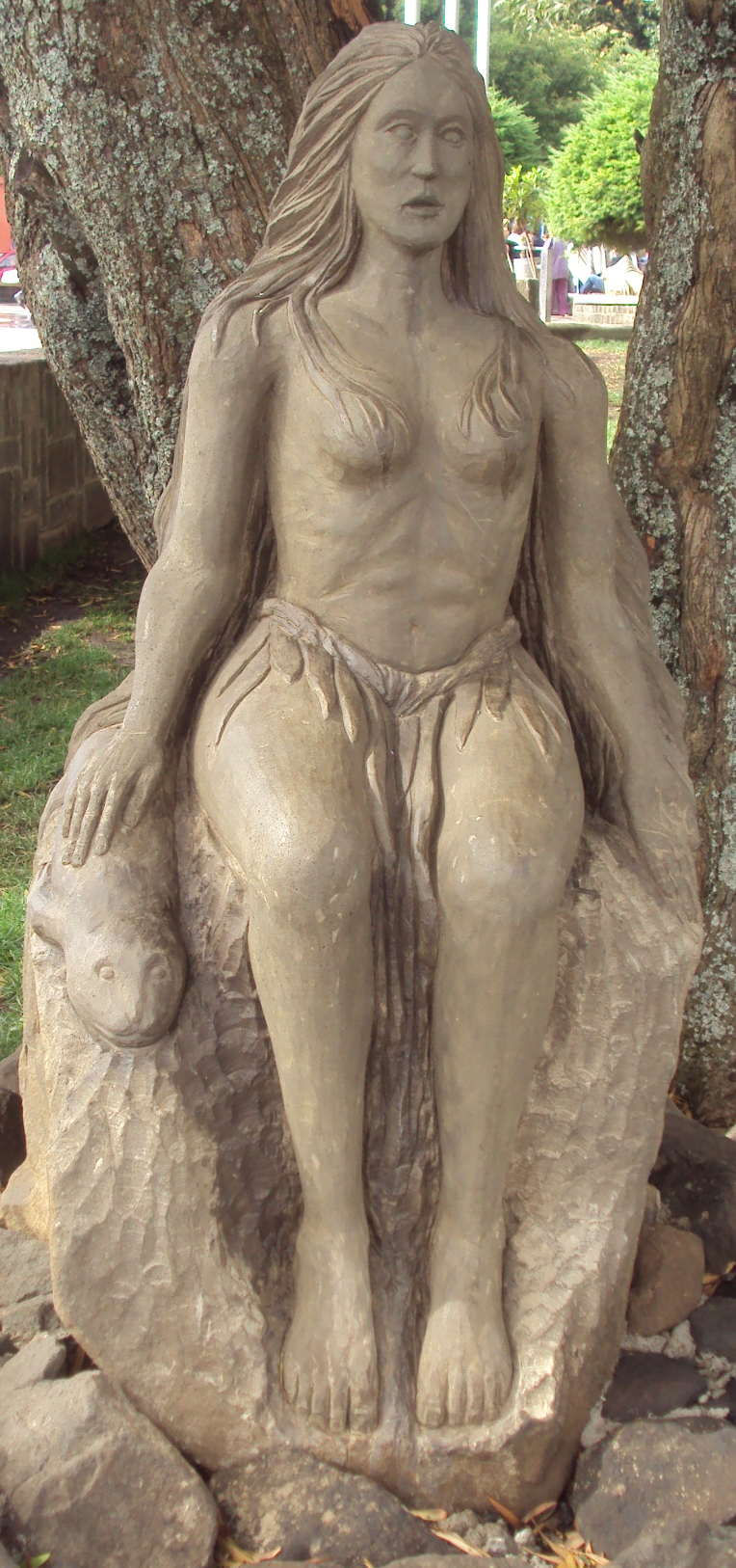 Estatua de la Pincoya en la Plaza de Ancud